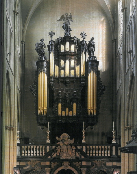 Foto kathedraalorgel, eigen foto - GFDL